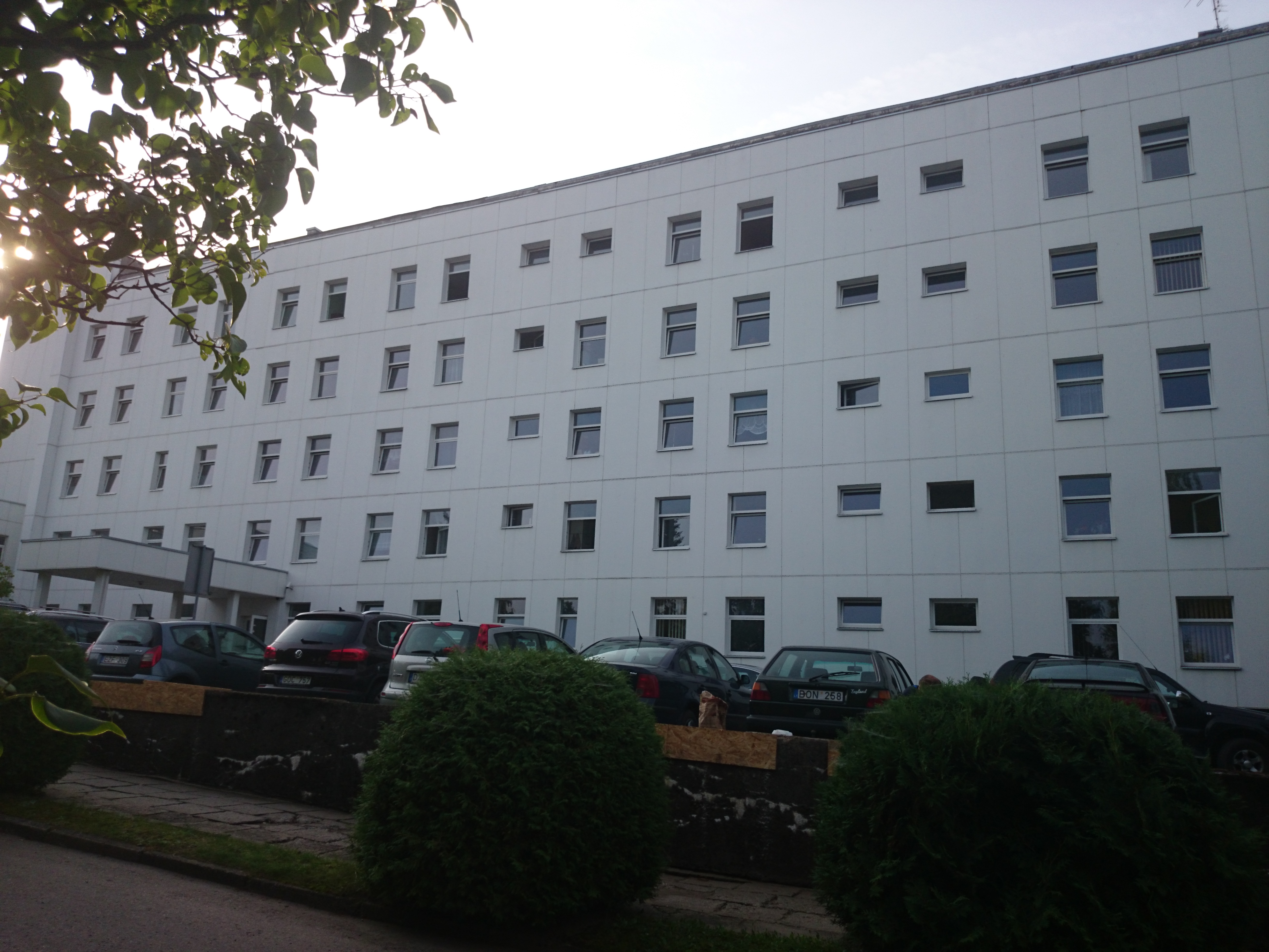 Hospitals in Jonava